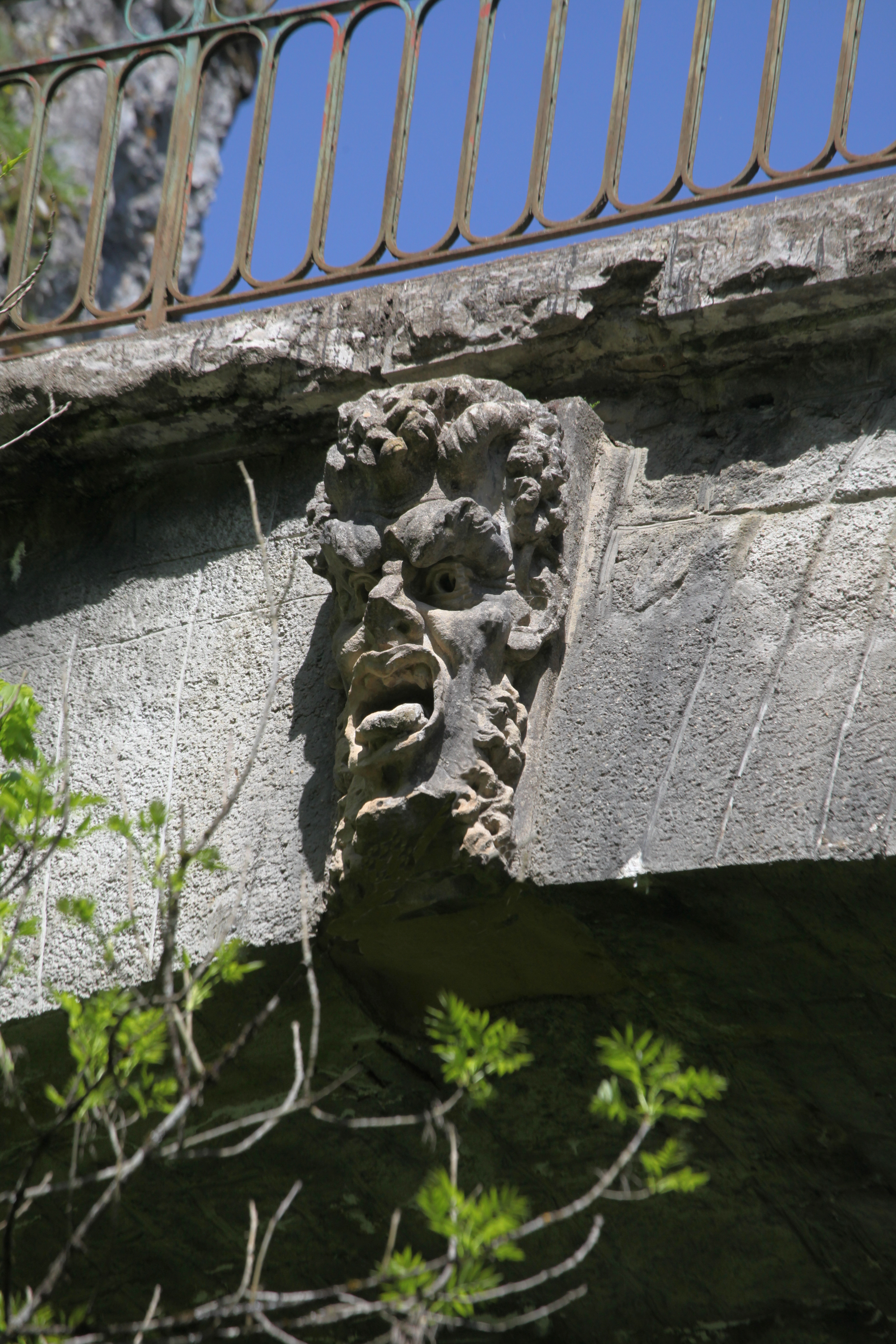 Figure sculptée sur le Pont du Diable entre Crouzet-Migette et Sainte-Anne (Doubs).